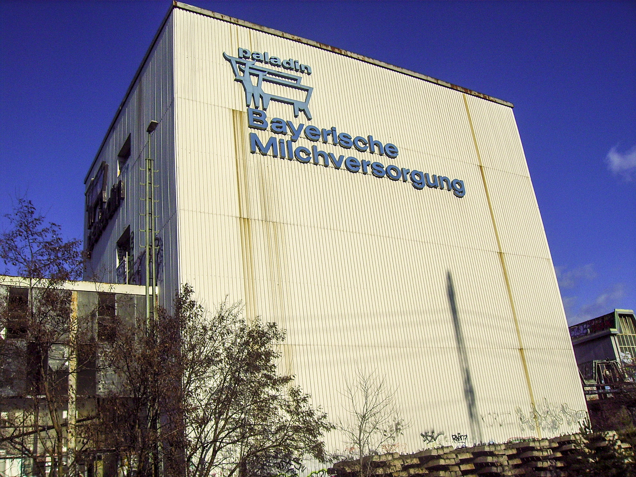 Milchhof Nürnberg, 2007, Ansicht von Norden